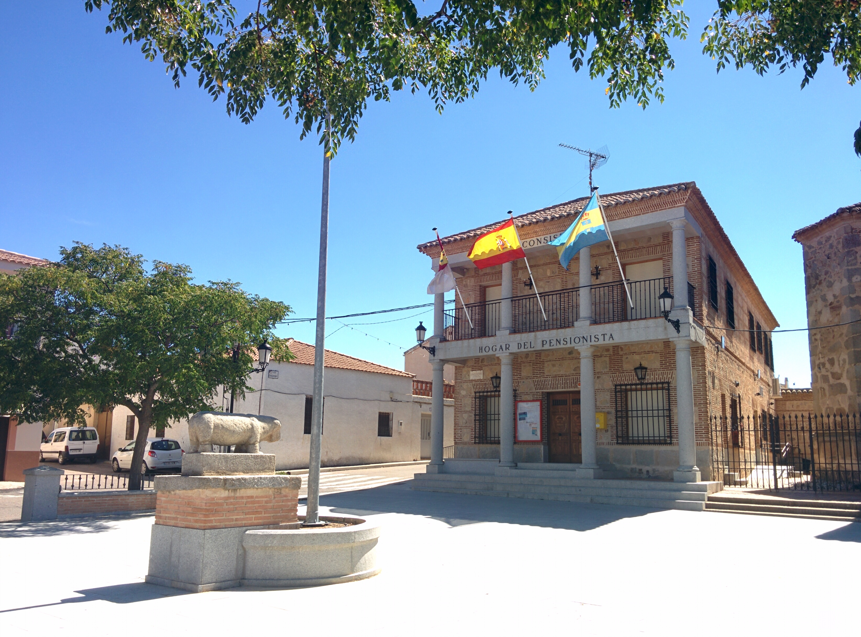 Casa consistorial de Totanés (Toledo, España).